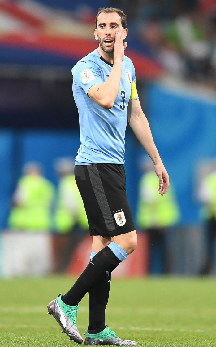 День, когда Роналду попрощался с ЧМ. Кавани и Суарес идут дальше